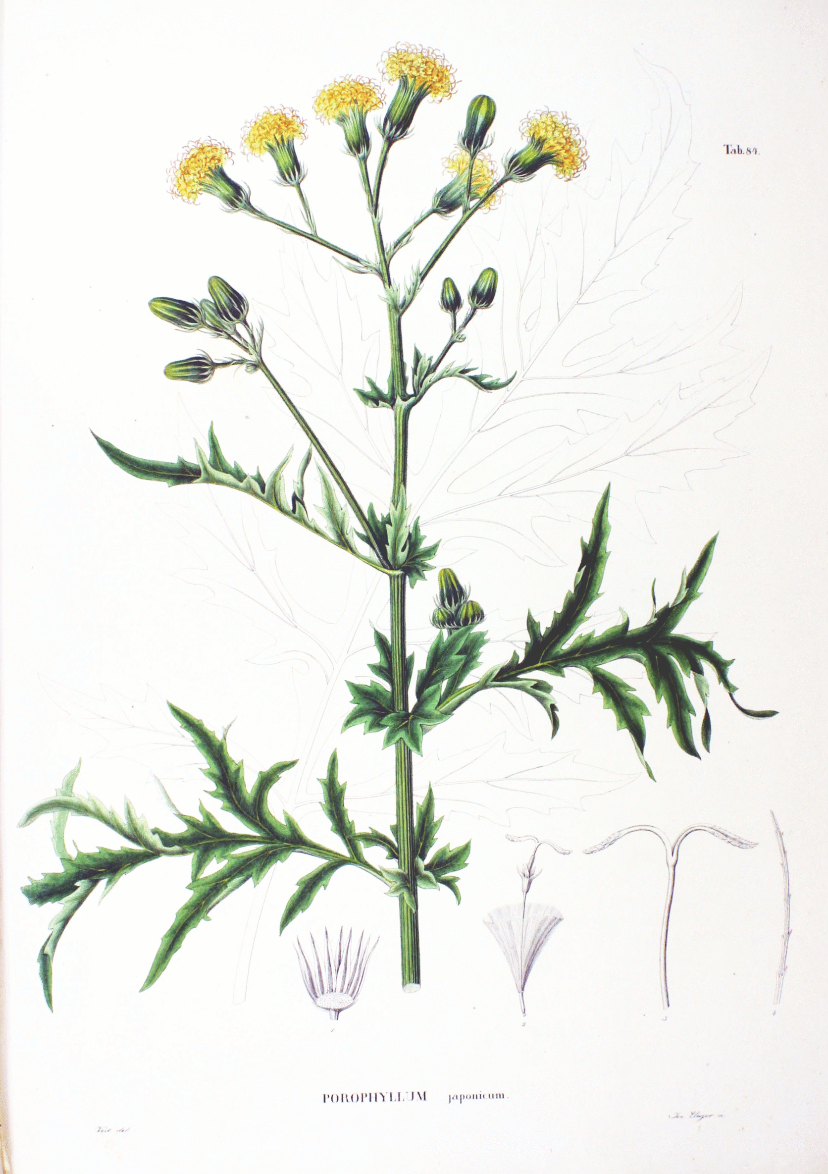 Gynura japonica Plate from book